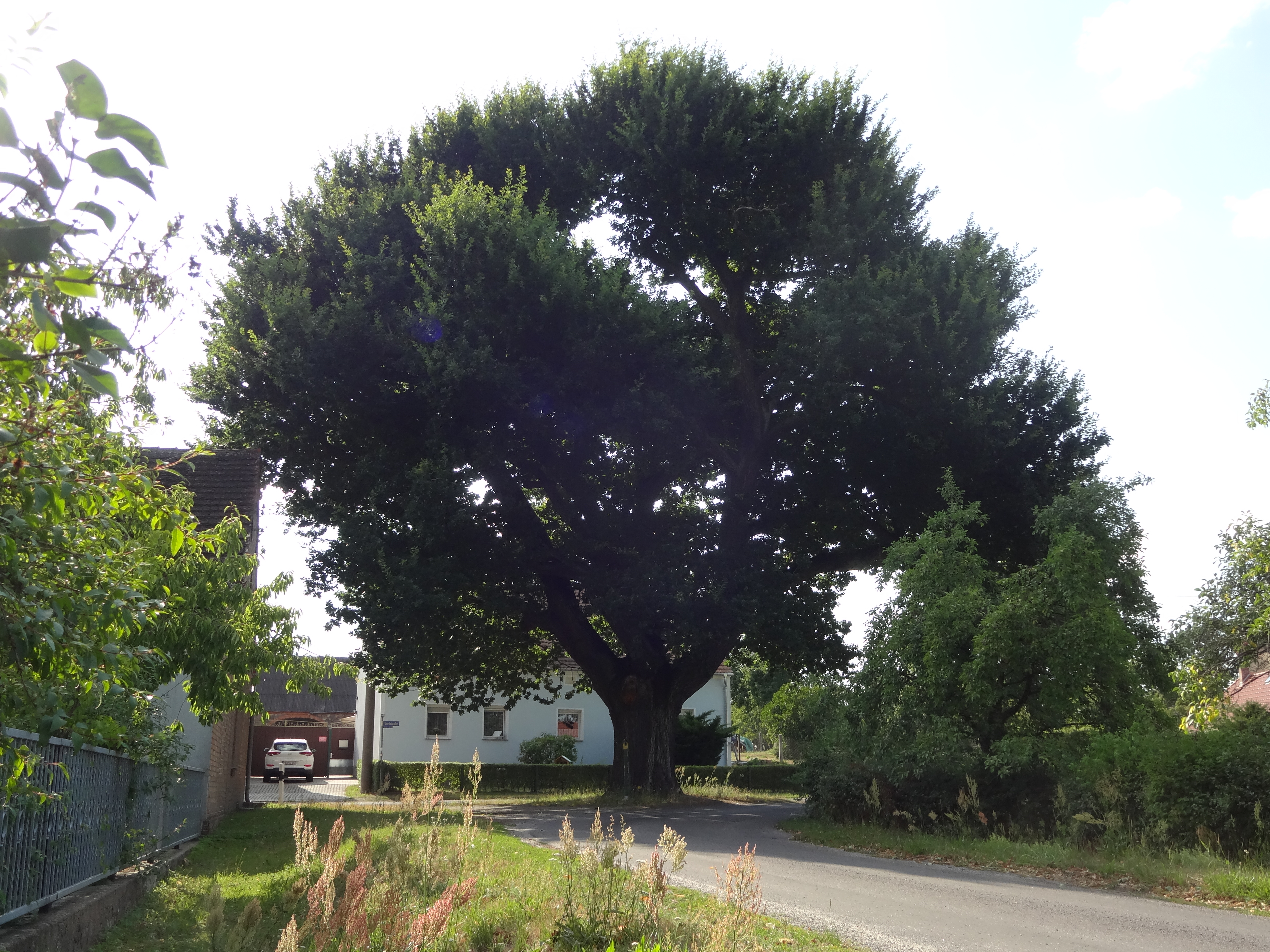 als Naturdenkmal Friedenseiche (Stieleiche) an der Kreuzung bei der ehemaligen Gaststätte in Bronkow